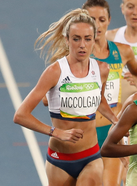 Rio de Janeiro - A queniana Vivian Jepkemoi Cheruiyot vence final e bate recorde olímpico dos 5 mil metros nos Jogos Rio 2016, no Estádio Olímpico (Fernando Frazão/Agência Brasil)